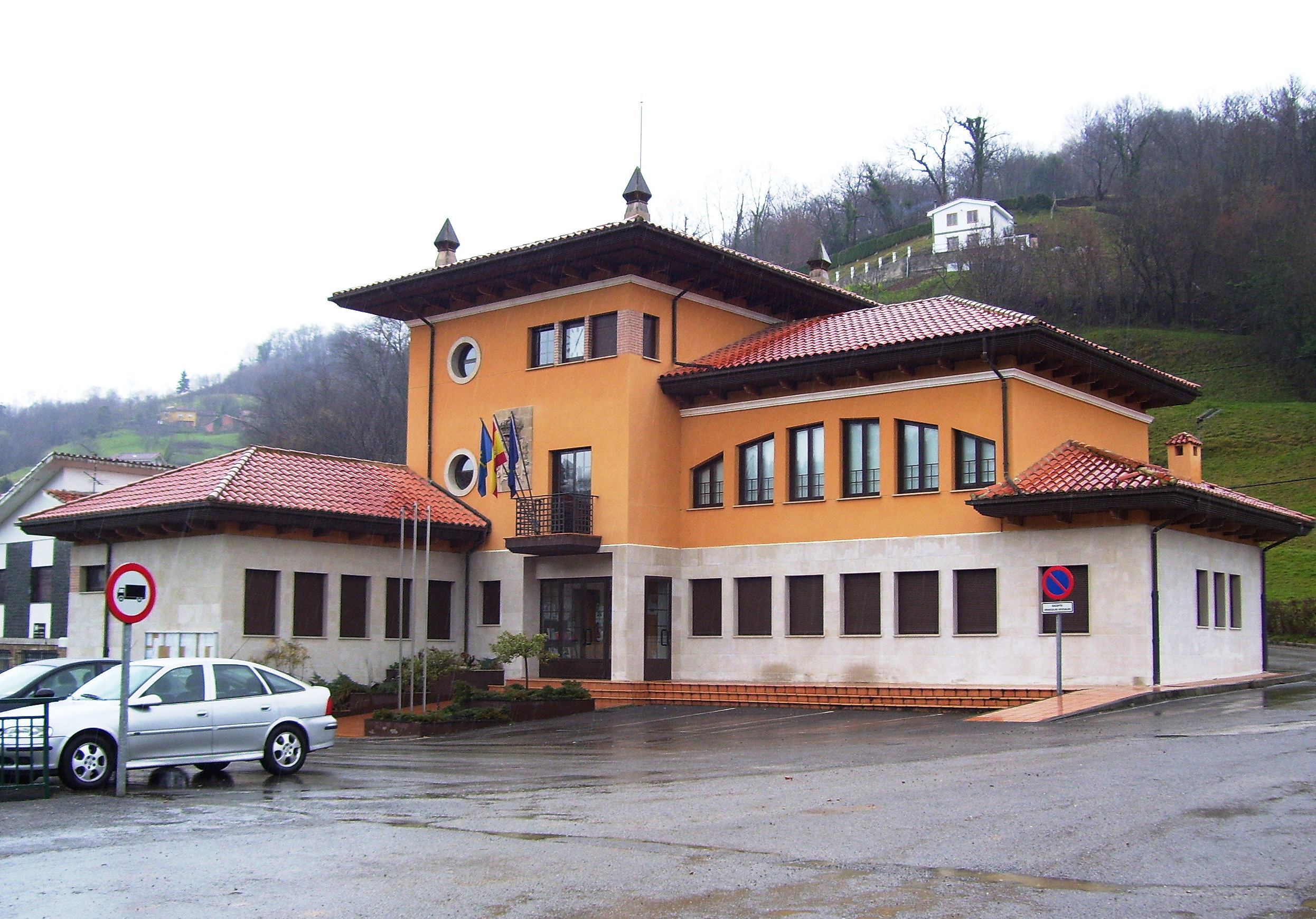 Edificio del Ayuntamiento de Bimenes, en el Principado de Asturias, España